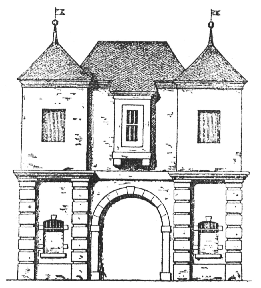 Flinger Tor in Düsseldorf